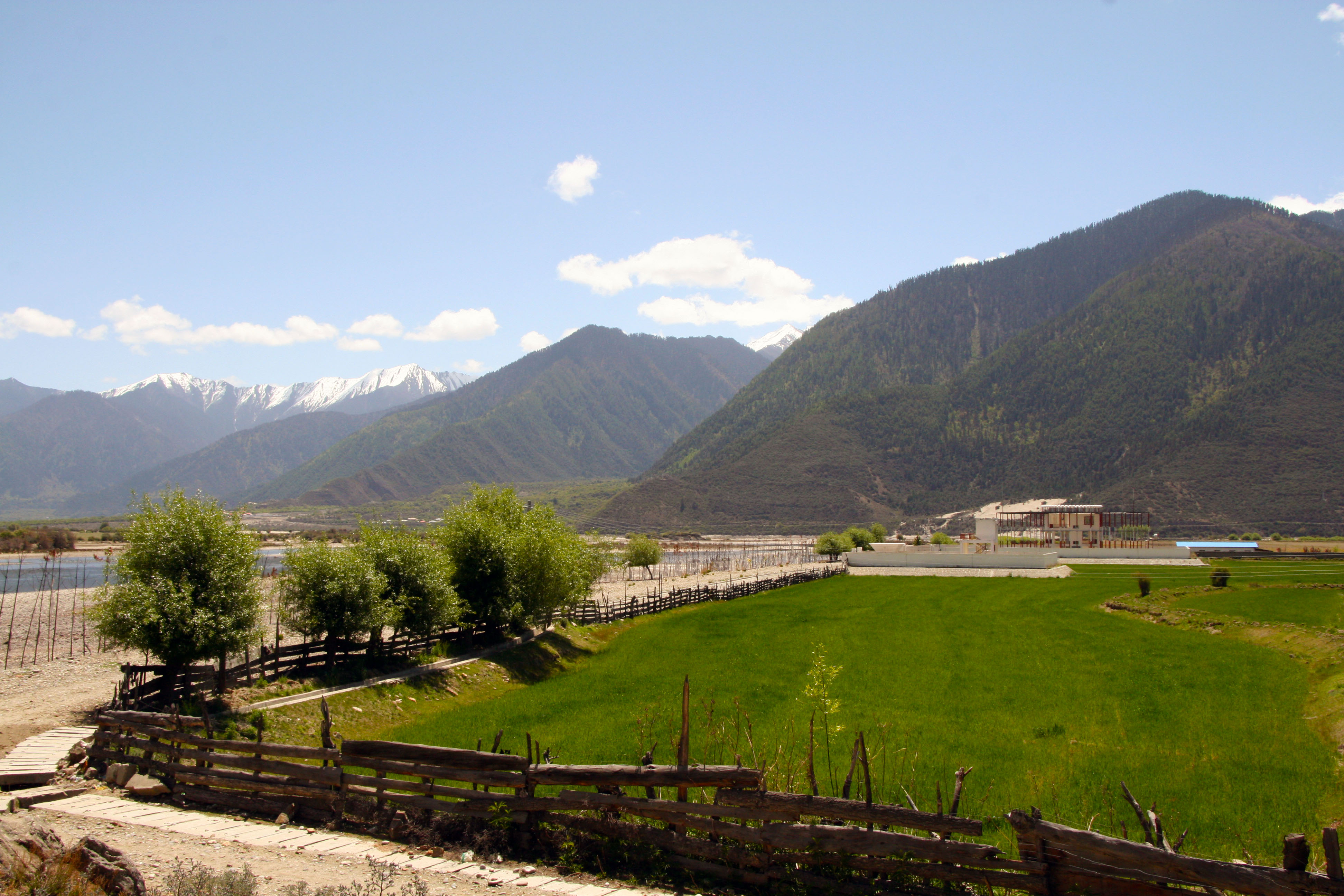 雅鲁藏布江边的田野